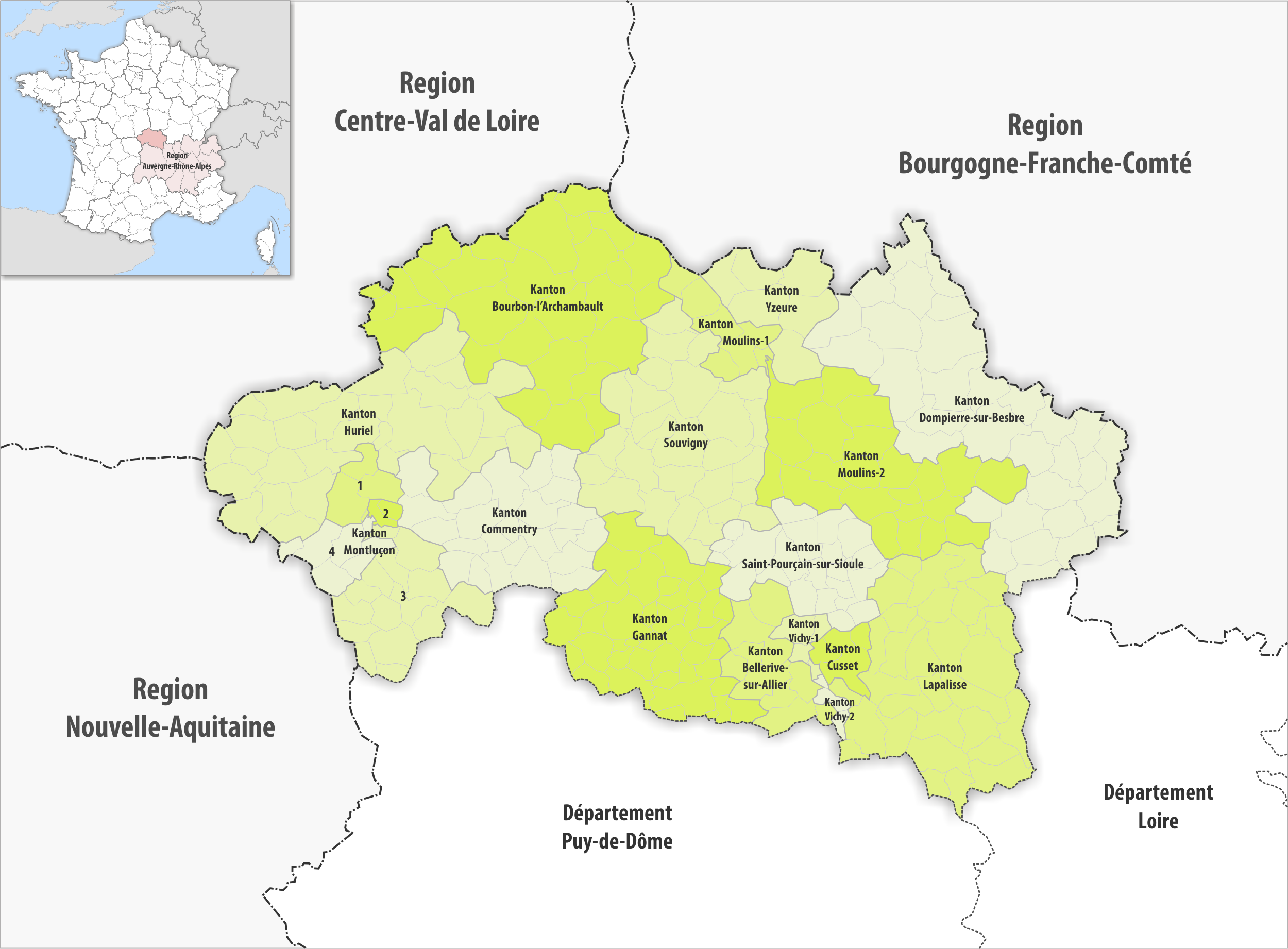 Gemeinden und Kantone im Departement Allier